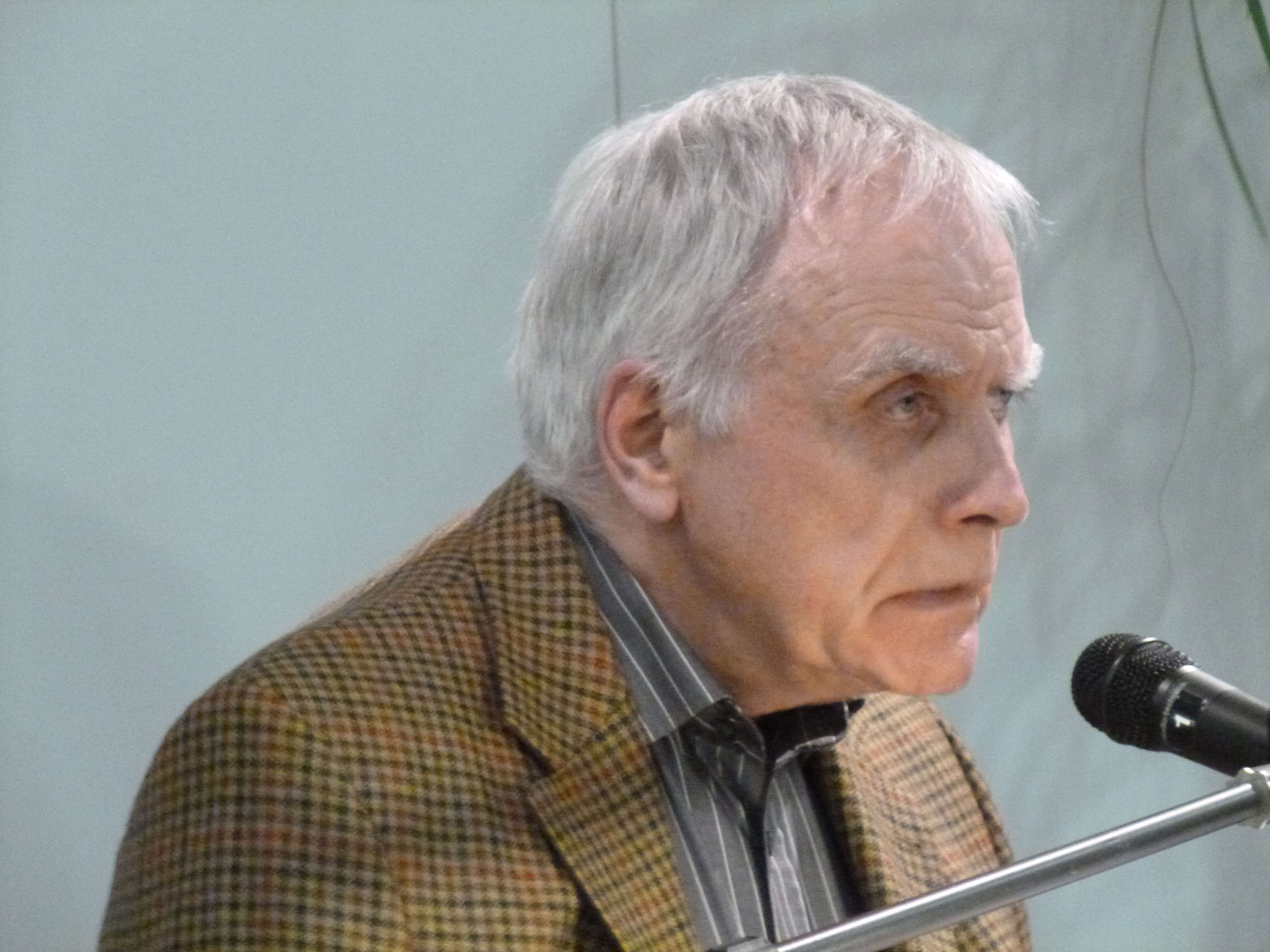 Moshe Kahn März 2015